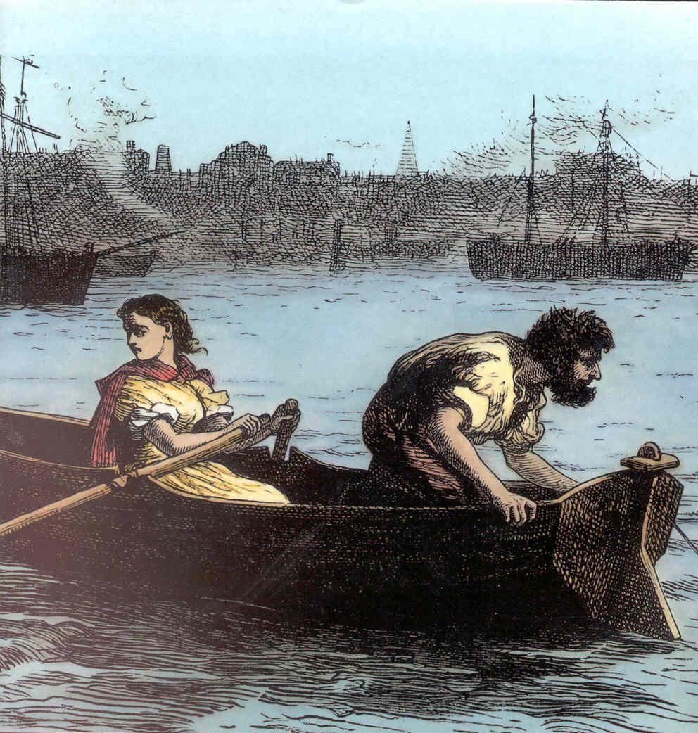 Illustration, sprich colorierte Radierung, aus Charles Dickens Our Mutual Friend, 1864, von Marcus Stone: The Gaffer and Lizzie (looking for the corpse?)